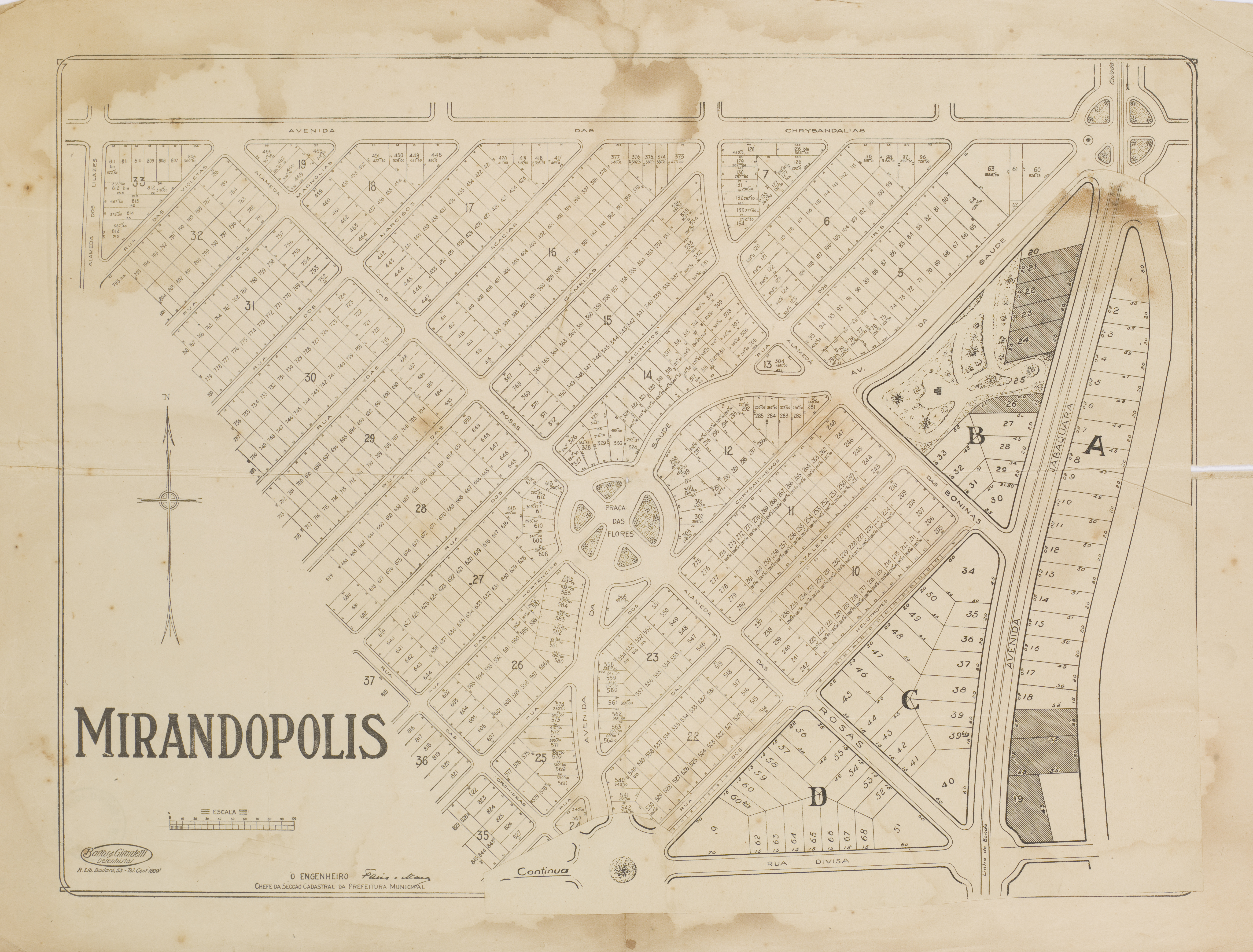 Obra que integra o acervo do Museu Paulista da USP. Coleção João Baptista de Campos Aguirra